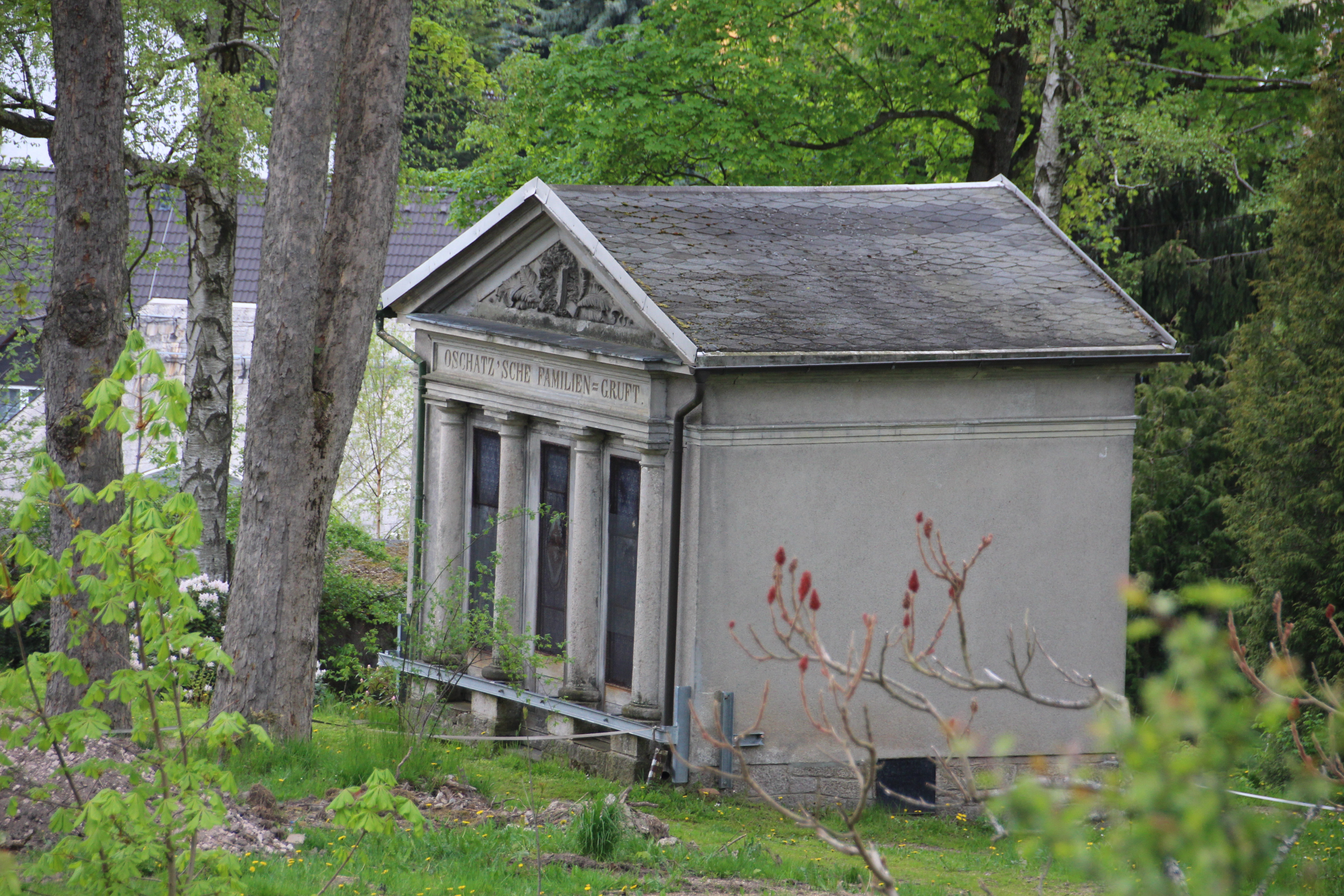 Schönheide im Erzgebirge: Mausoleum der Familie Oschatz, früher Inhaber einer großen Bürstenfabrik in Schönheide. Es ist ein Kulturdenkmal und wird vom Landesamt für Denkmalpflege so beschrieben: Gruft auf altem Friedhof; repräsentative Familiengrablege der Jahrhundertwende, Zeugnis großbürgerlicher Sepulkralkultur, von orts- und bauhistorischer Bedeutung. Zur Datierung gibt das Landesamt an: 2. Hälfte 19. Jahrhundert (Friedhofsbestandteil) Bis zum Jahr 1838 war ein Teil der Fläche des heutigen Marktplatzes und die, auf der seit 1882 das Rathaus steht, der Schönheider Friedhof. Der 1838 angelegte und 1883 erweiterte Friedhof am Rathausberg in der Trägerschaft der Evangelisch-lutherischen Kirchgemeinde Schönheide war bis zum Jahr 1995 Friedhof für die Schönheider, ob sie Mitglied der Schönheider Kirchgemeinde, anderer evangelisch-lutherischer Kirchengemeinden, Mitglied der römisch-katholischen Kirche oder keiner Religionsgruppe angehörten. 1908 wurde die Friedhofskapelle gebaut. Nach der Entfernung fast aller Grabsteine im Jahr 2015, also 20 Jahre nach den letzten Beerdigungen, stehen auf der parkartigen Fläche nur noch die als Kulturdenkmale eingestuften Grabstätten, die in der Liste der Kulturdenkmale in Schönheide stehen. Es sind dies die Grabmäler der früheren Eigentümer der Eisengießerei Schönheiderhammer, Familie von Querfurth, und einiger anderer Familien, denen früher größere Bürstenfabriken gehörten, Familien Flemming und Oschatz. Außerdem zählen dazu noch einige Grabmäler anderer Familien, so die der Familie C. G. Tuchscherer (Textilien) und Lenk (Bürsten). Sie sind in mehr oder minder stärkerem Verfall und werden nur sehr eingeschränkt unterhalten. Heute wird dieser Friedhof als "alter Friedhof" bezeichnet. Vom Jahr 2016 an wurde er als Park umgestaltet.